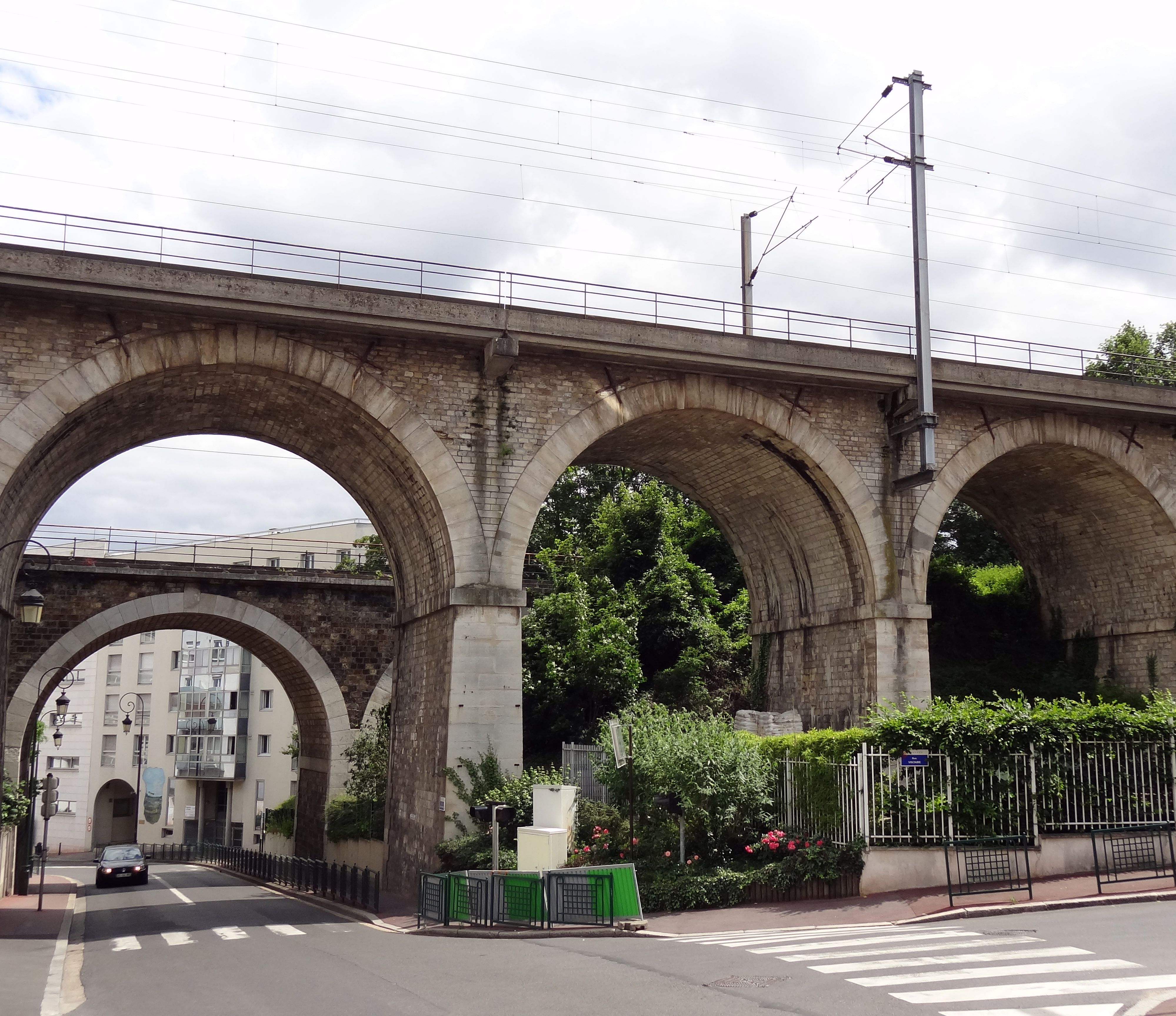 Ponts ferroviaires en pierre au dessus de la rue des Bas-Rogers vus de l'angle de la rue Voltaire, à la limite de Suresnes (à droite) et de Puteaux (gauche), Hauts-de-Seine, France.